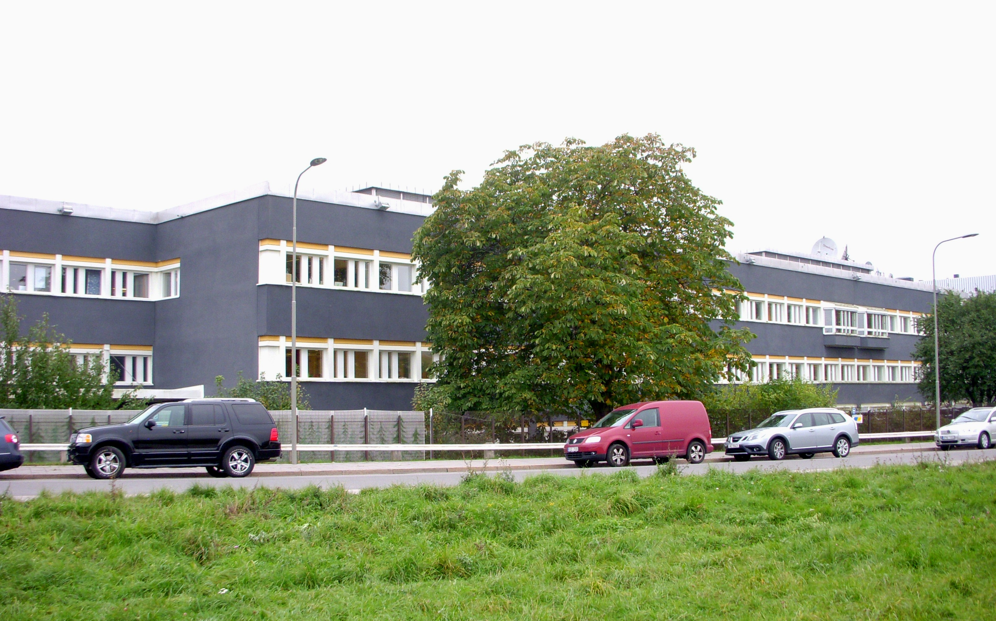 TV-husets fasad mot Valhallavägen och Gärdet